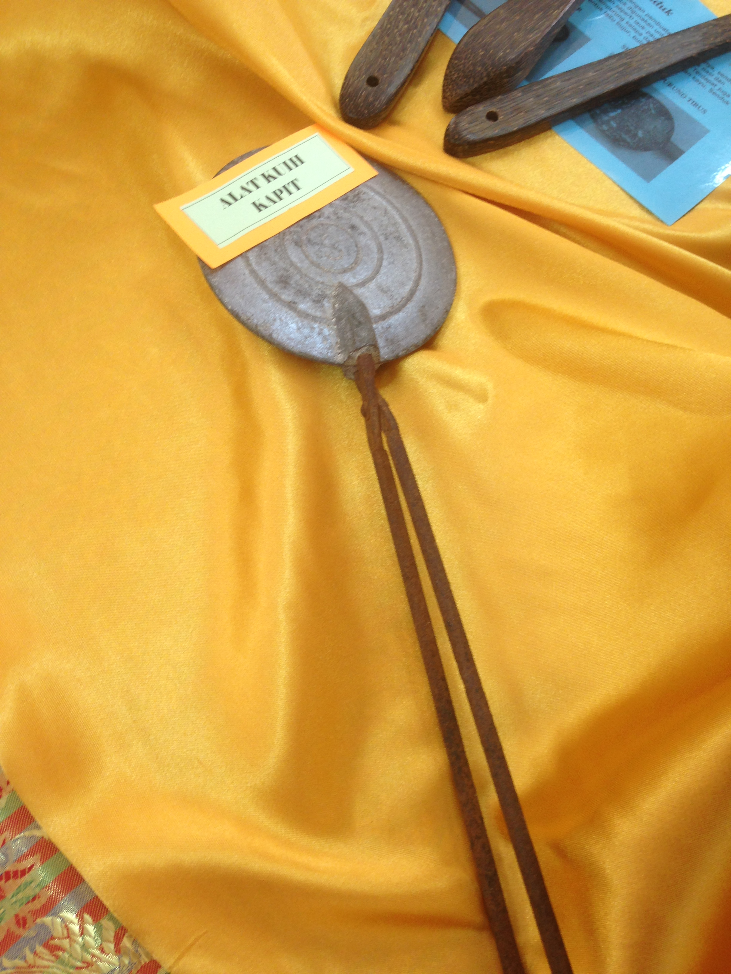 ALAT KUIH KAPIT